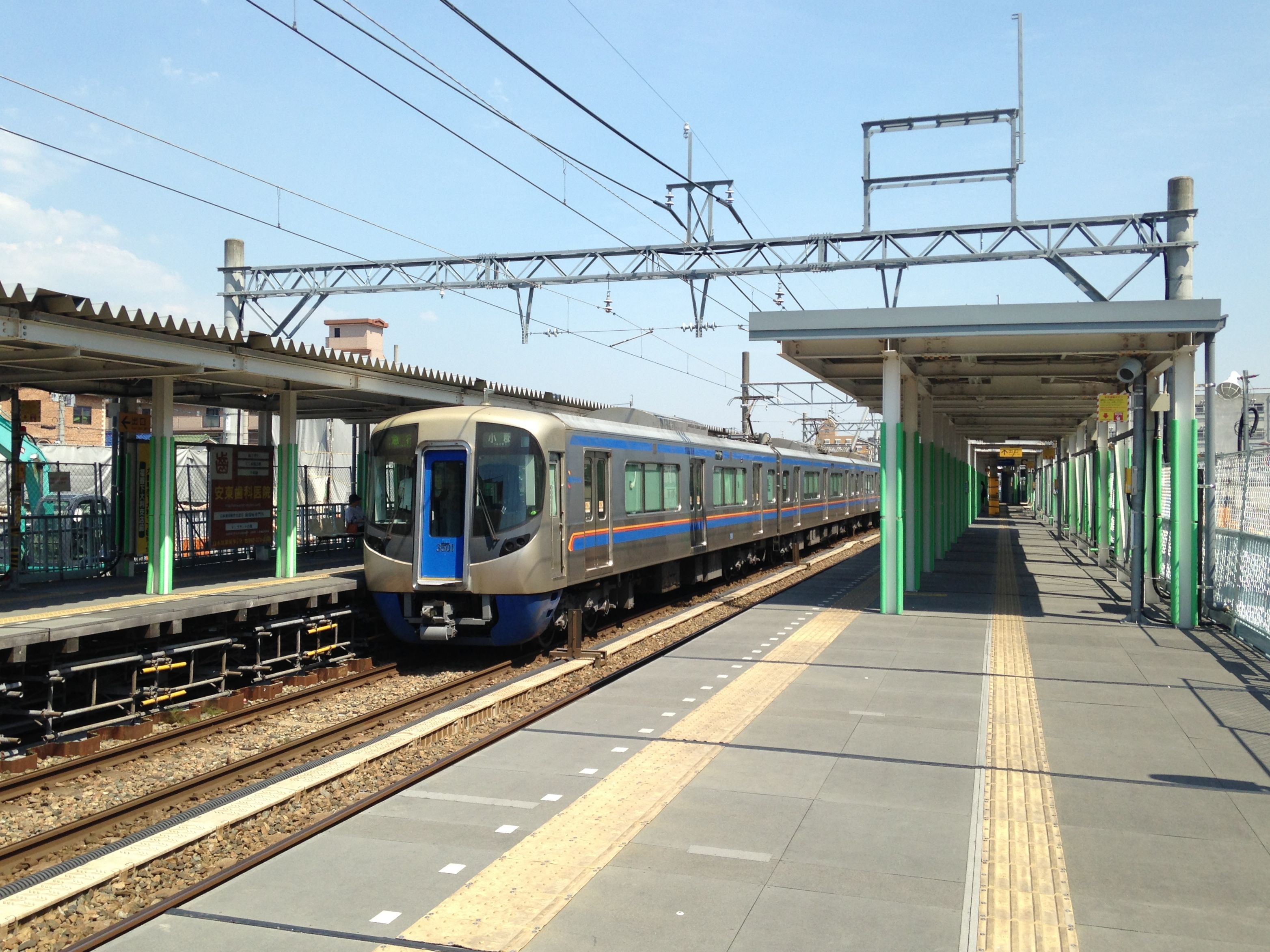 白木原駅のホーム(下大利方面)と西鉄小郡行き急行電車